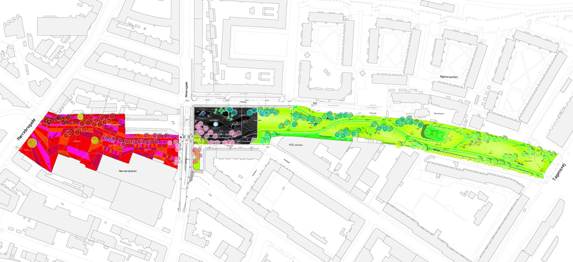 [ 準建築人手札網站 Forgemind ArchiMedia BIG建築師事務所 Bjarke Ingels Group - 哥本哈根 Superkilen Park 在地多元族群的都市公園]